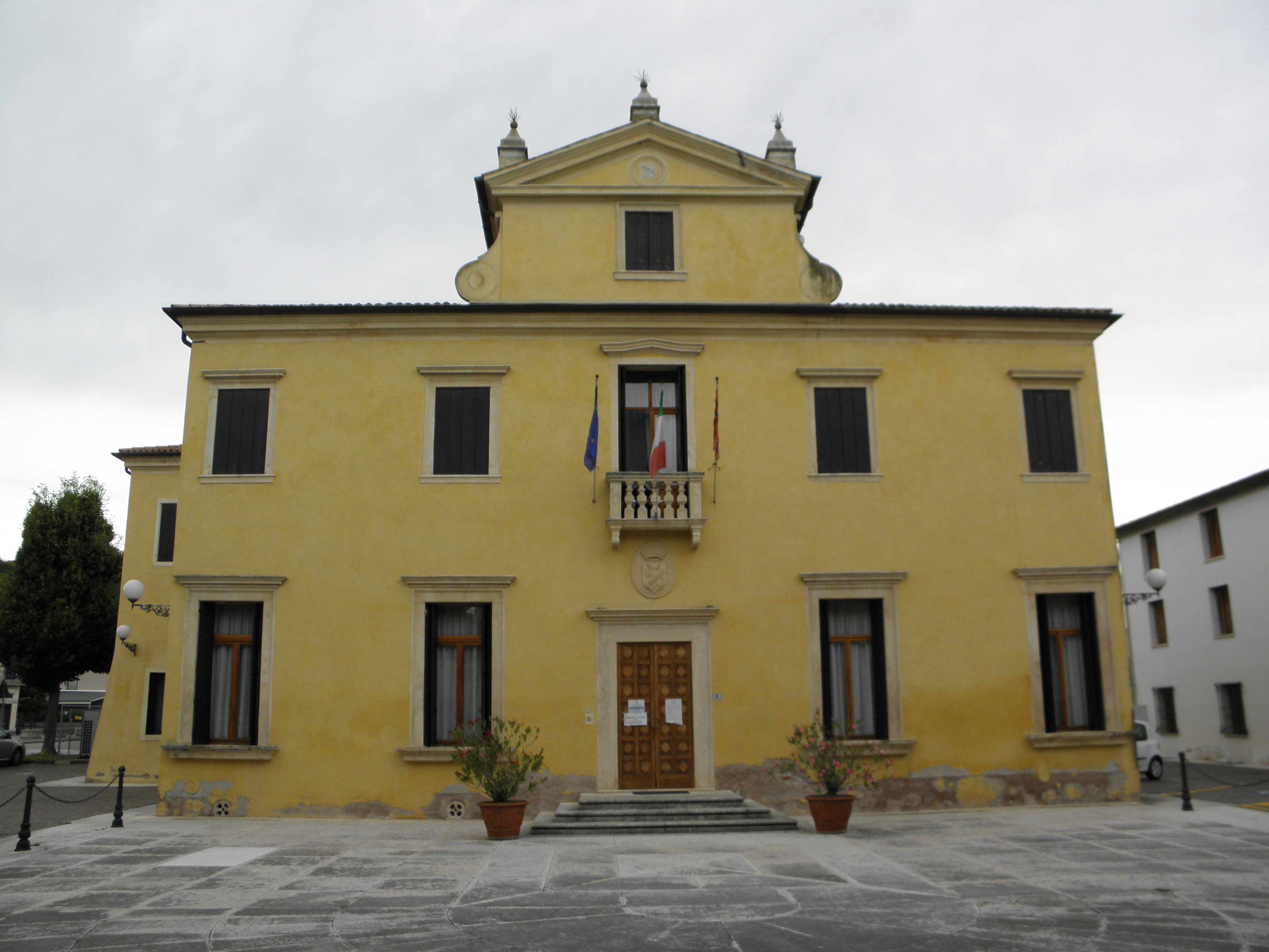 Sossano, villa Ferramosca Giovanelli, XVI secolo con ristrutturazioni del XVIII secolo, sede municipale del comune di Sossano.